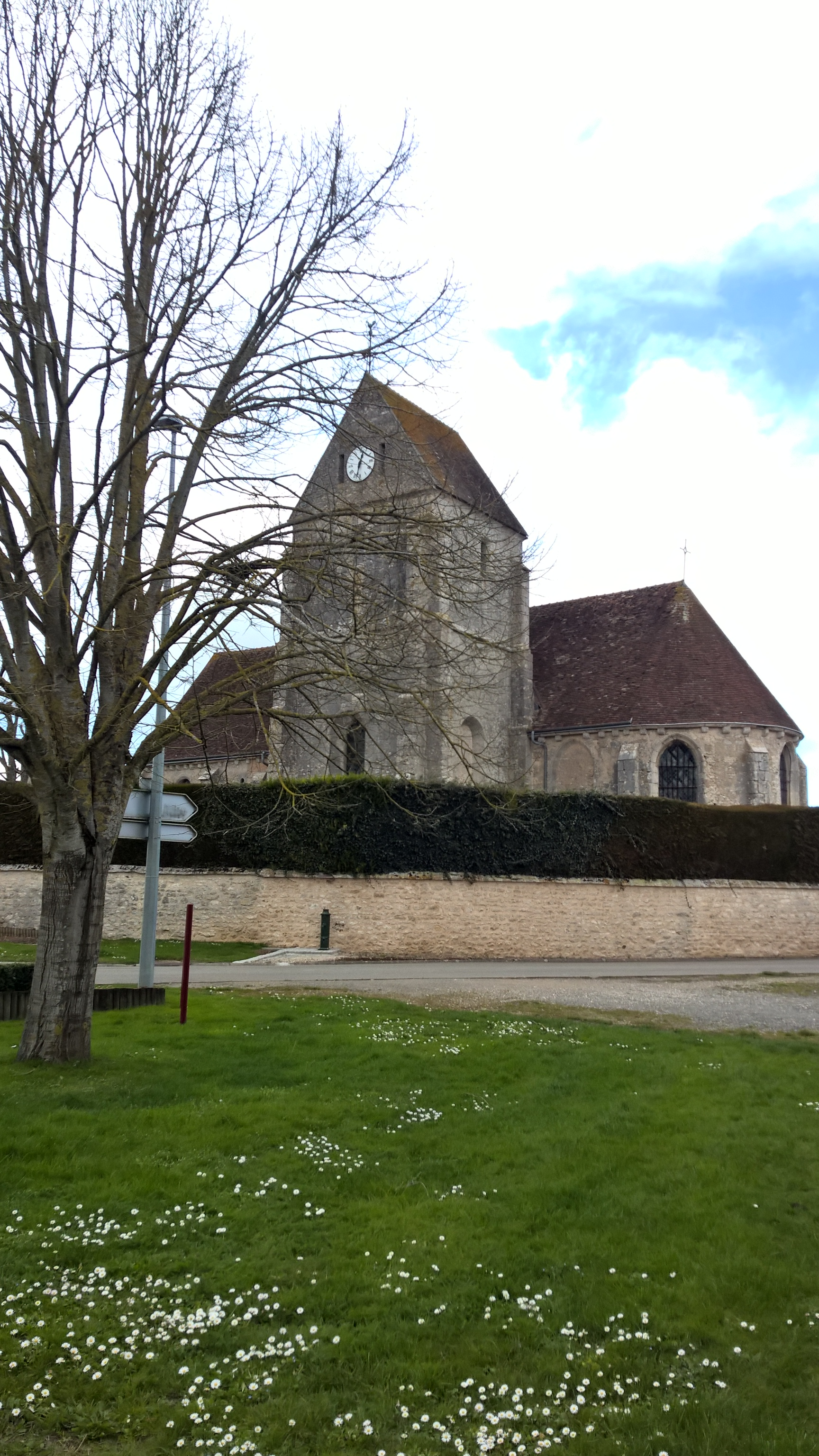 Eglise Saint Laurent Corancez Eure-et-Loir